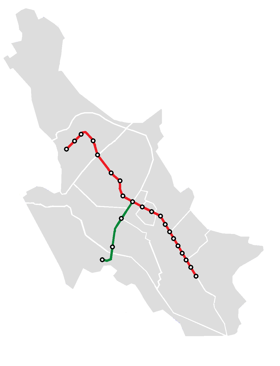 نقشه جغرافیایی خطوط قطار شهری شیراز و مناطق شهرداری شهر